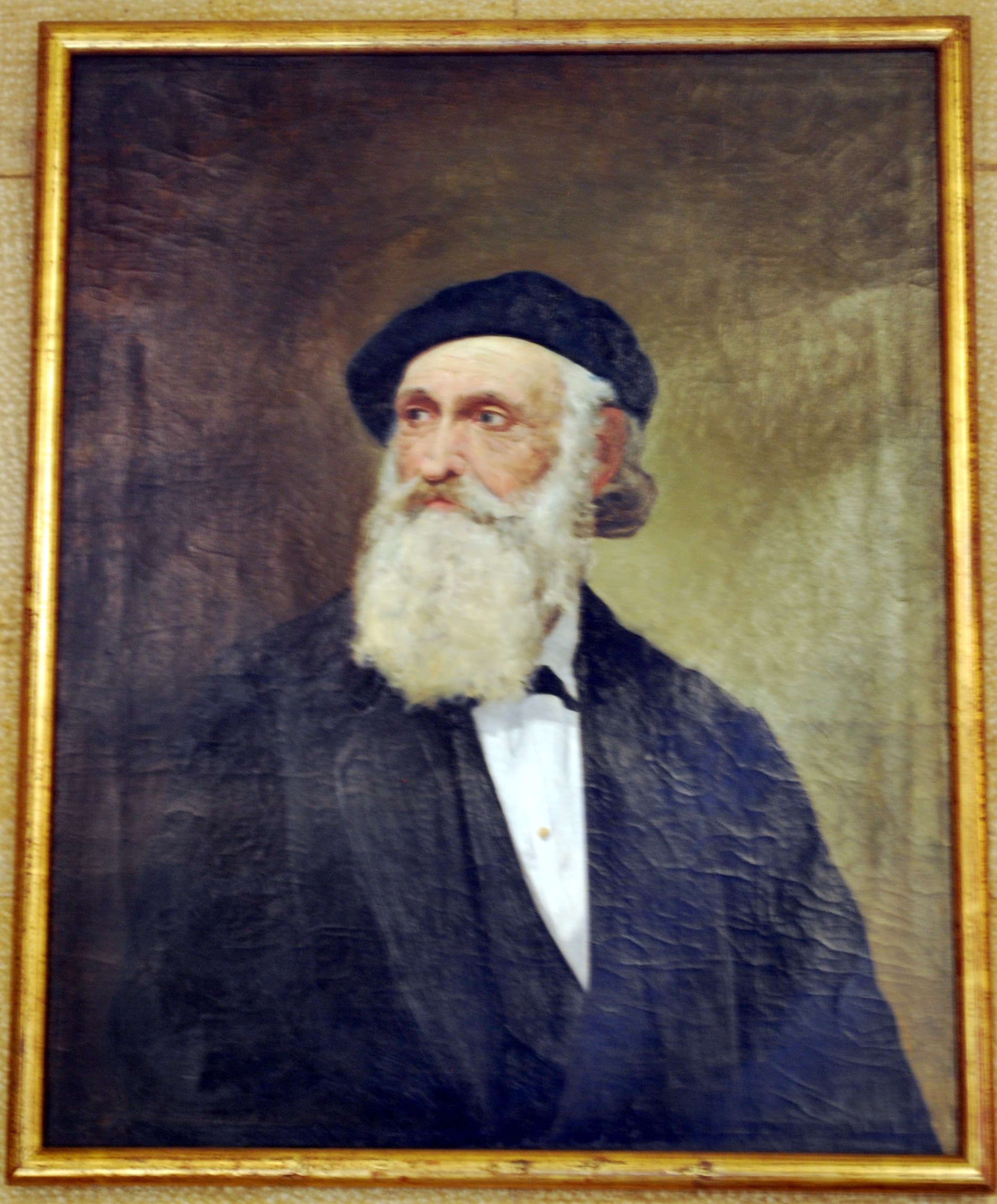 Portrait du fameux barde basque José Maria Iparraguirre qui composa Gernikako arbola (salle attenante du Parlement de Biscaye à Gernika - Biscaye).